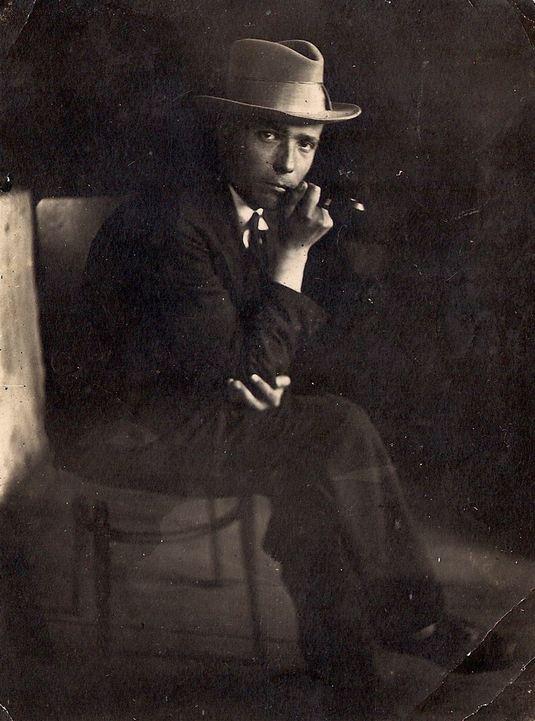 Беларуская (тарашкевіца): Беларускі паэт Рыгор Папараць